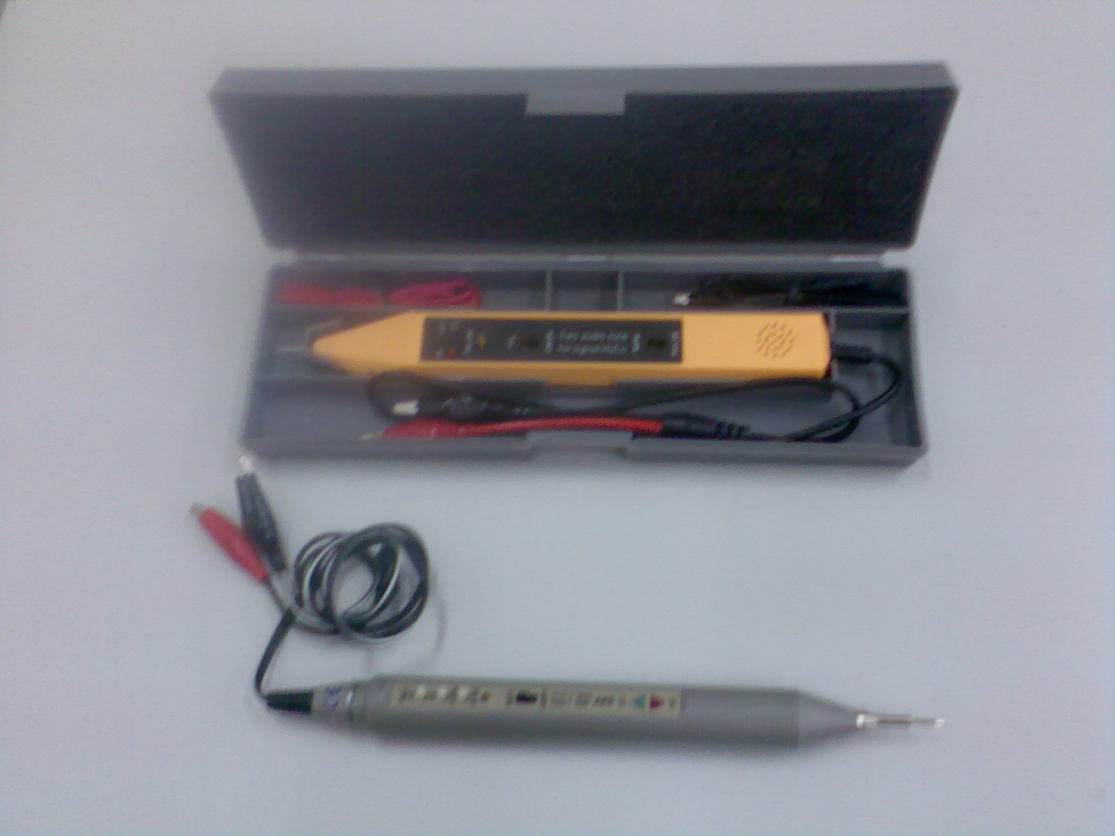 Logic probe